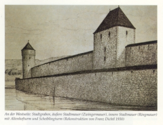 Turm der alten Burg / Salzhof - Rekonstruktion (1885 abgebrannt)